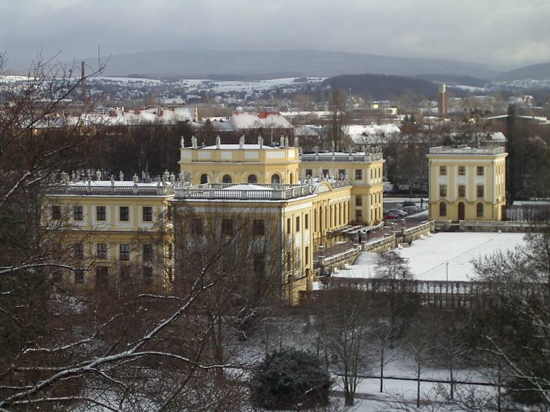 Beschreibung Kassel, Orangerie, Gesamtansicht von der Schönen Aussicht, von NNO. Fotograph --Keichwa